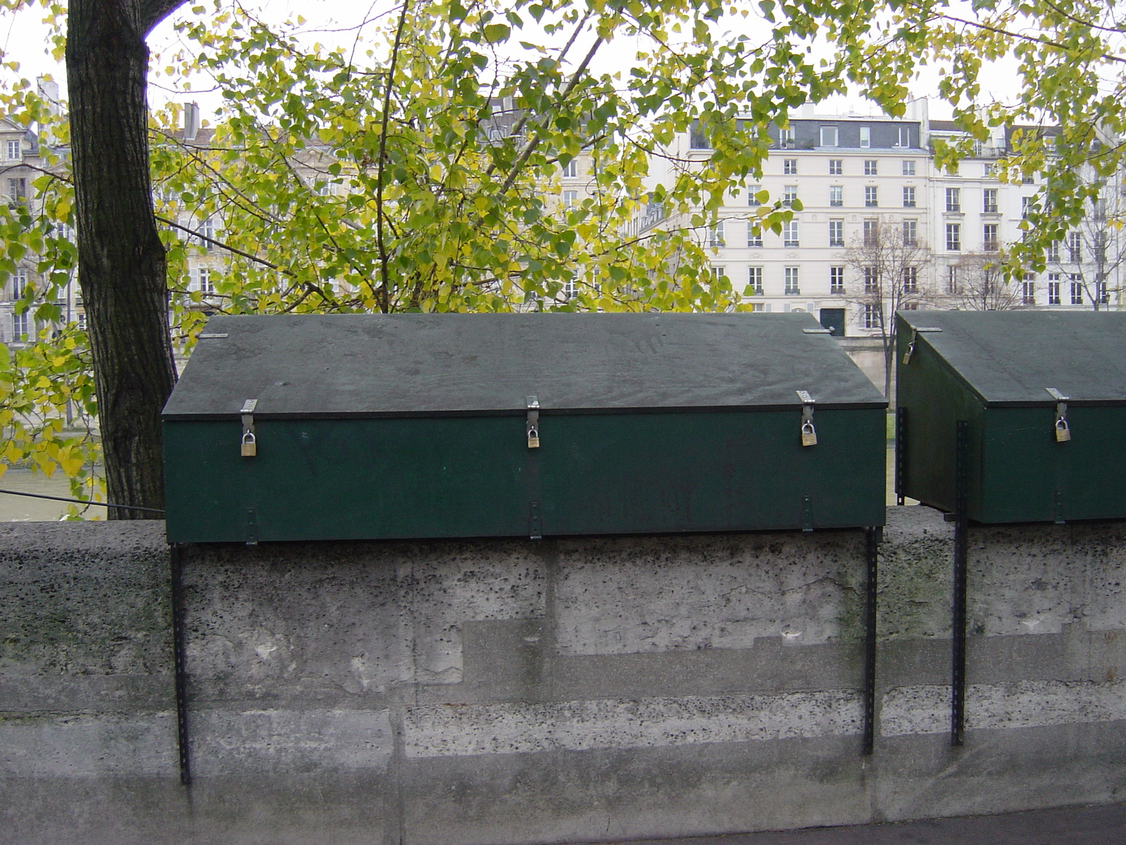 Boîte de bouquiniste fermée et cadenassée, fixé sur le parapet du quai de l'Hôtel de Ville; les façades en arrière-plan appartiennent aux maisons situées sur l'île Saint-Louis de part et d'autre de la rue Le Regrattier sur le quai de Bourbon IVe arrondissement, Paris, France.